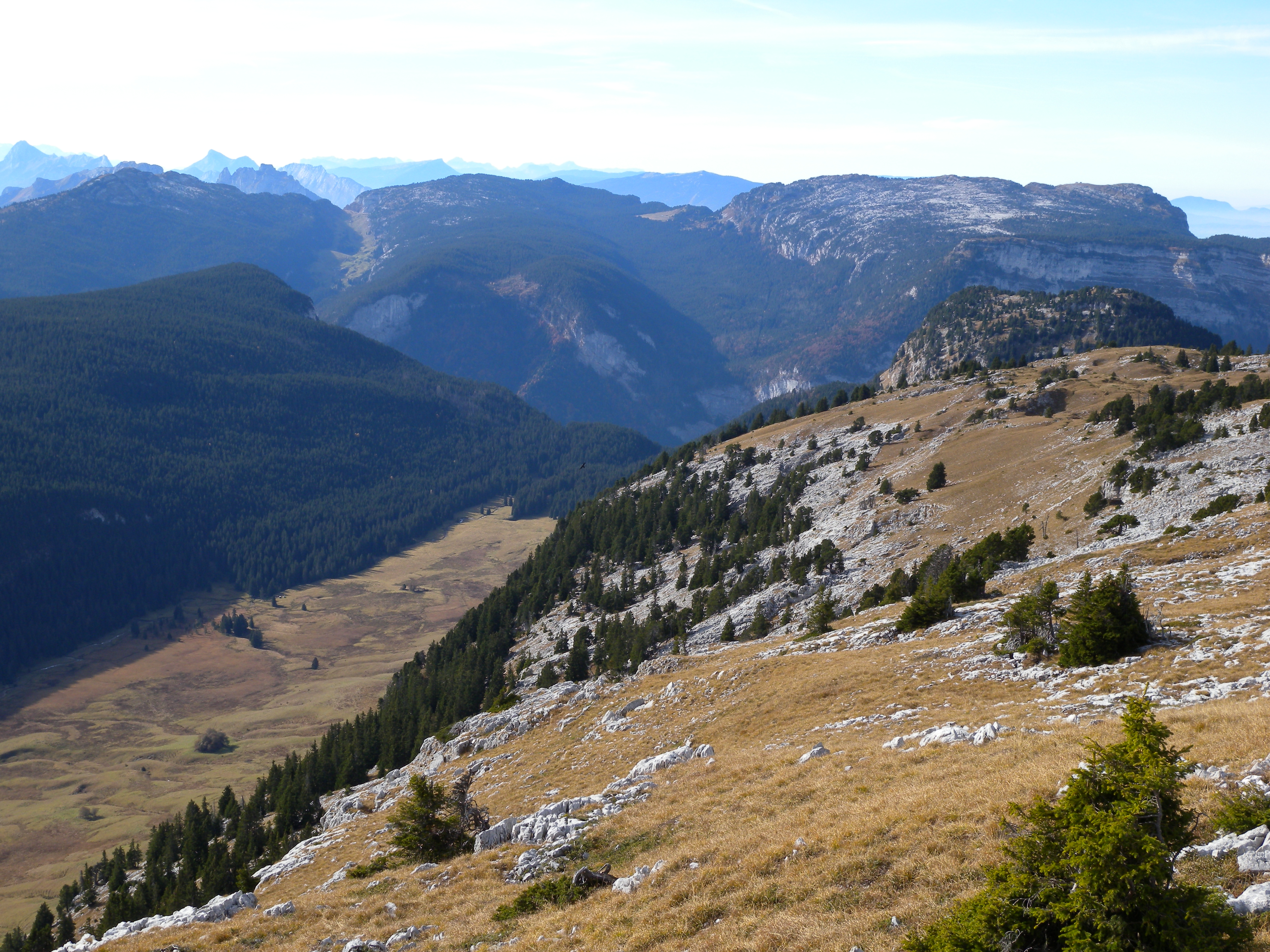 Ablon- Vallee du Pertuis - Parmelan depuis la montagne de Sous-Dîne